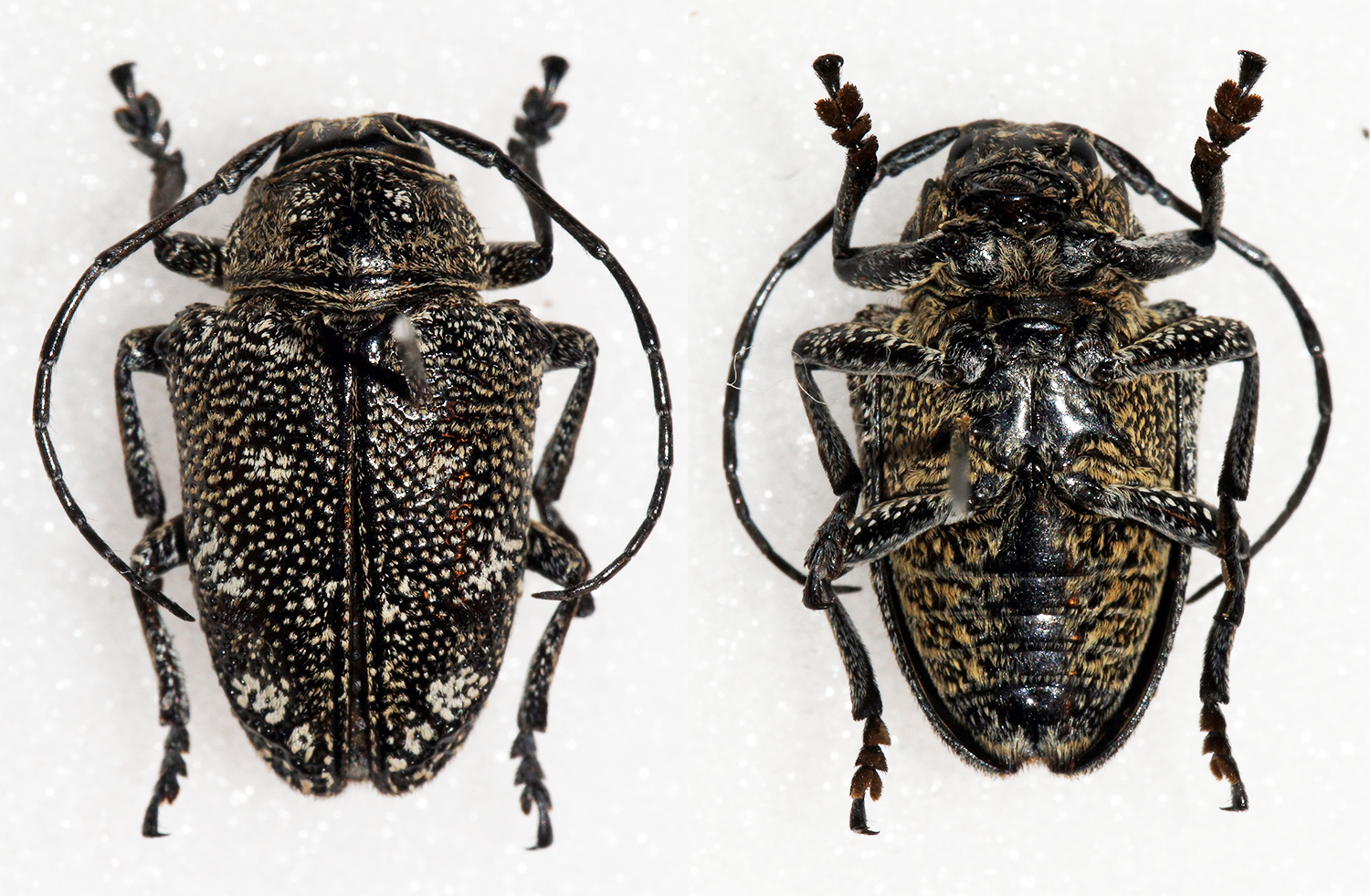 Quedenfeldt,1882 Sex: ? Data: 04-2014 - Kirima - Ituri - Nord Kivu - DR Congo Size: 12.5mm